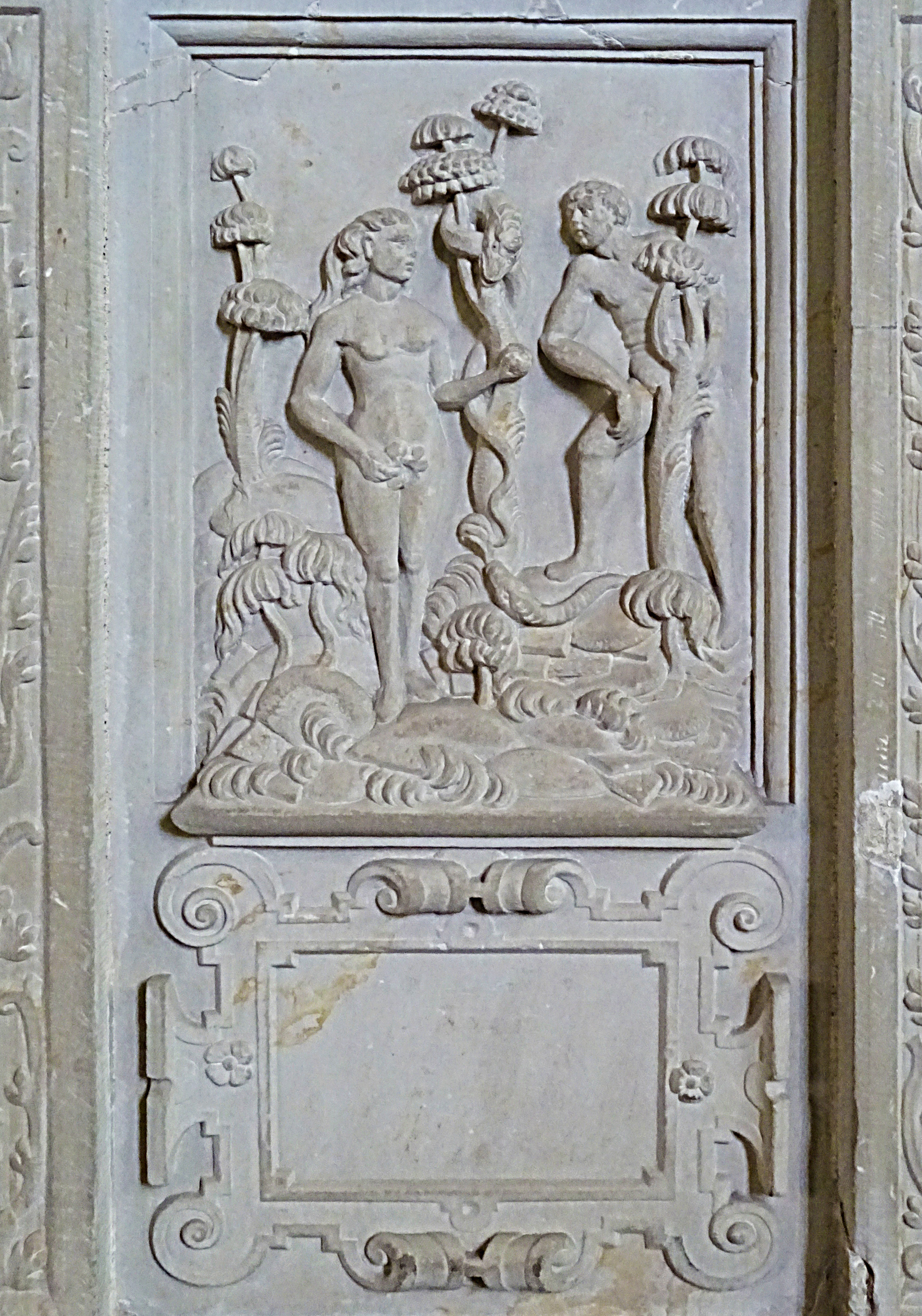 Steinbilderbibel in der St. Annenkirche (Eisleben), 05/29, Sündenfall